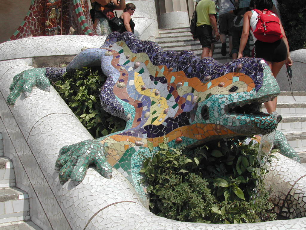 Parc Güell - Salamander Statue